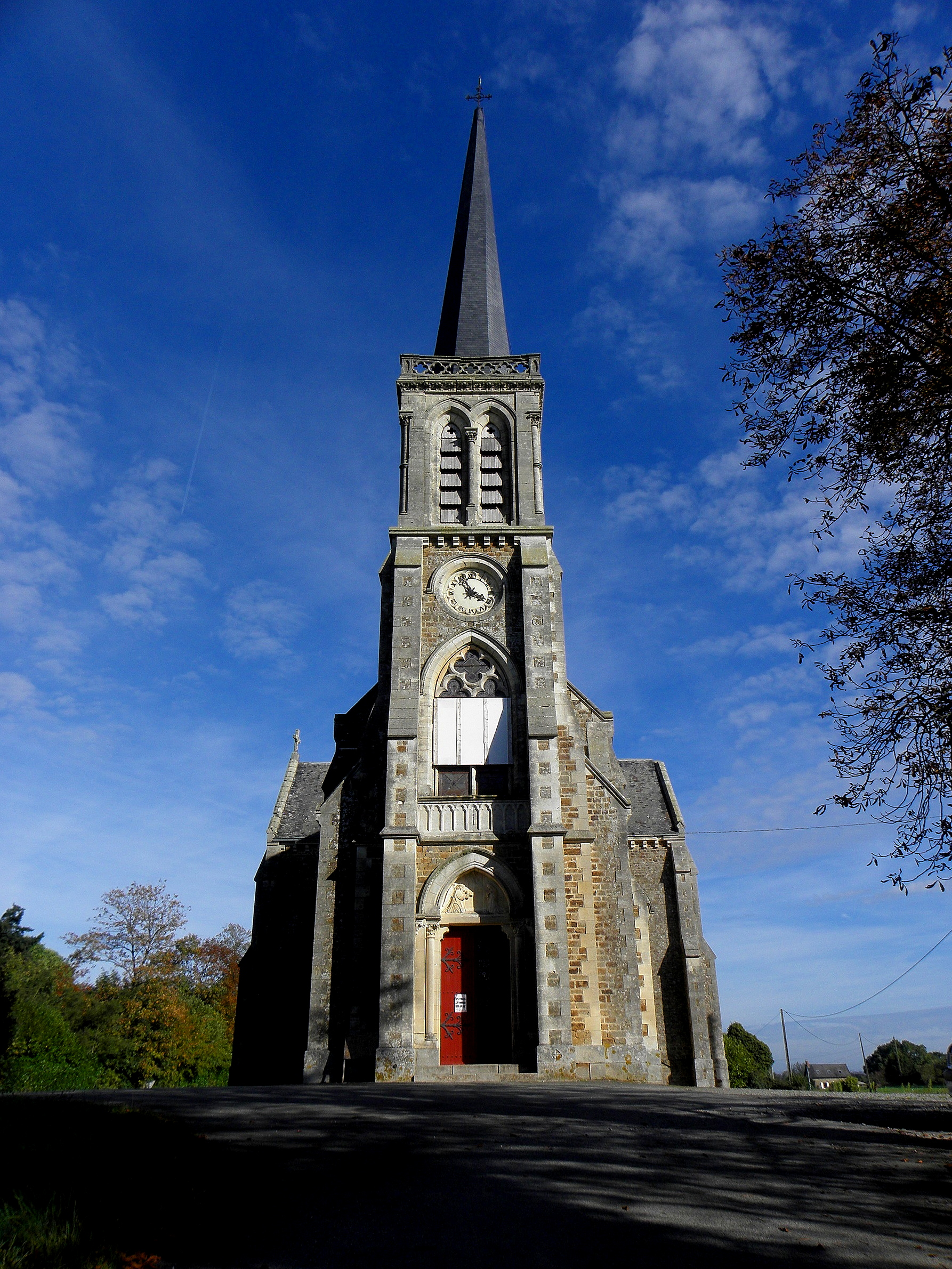 L'église Notre-Dame-de-l'Assomption, lieudit Mégaudais, commune de Saint-Pierre-des-Landes (53). Façade principale.